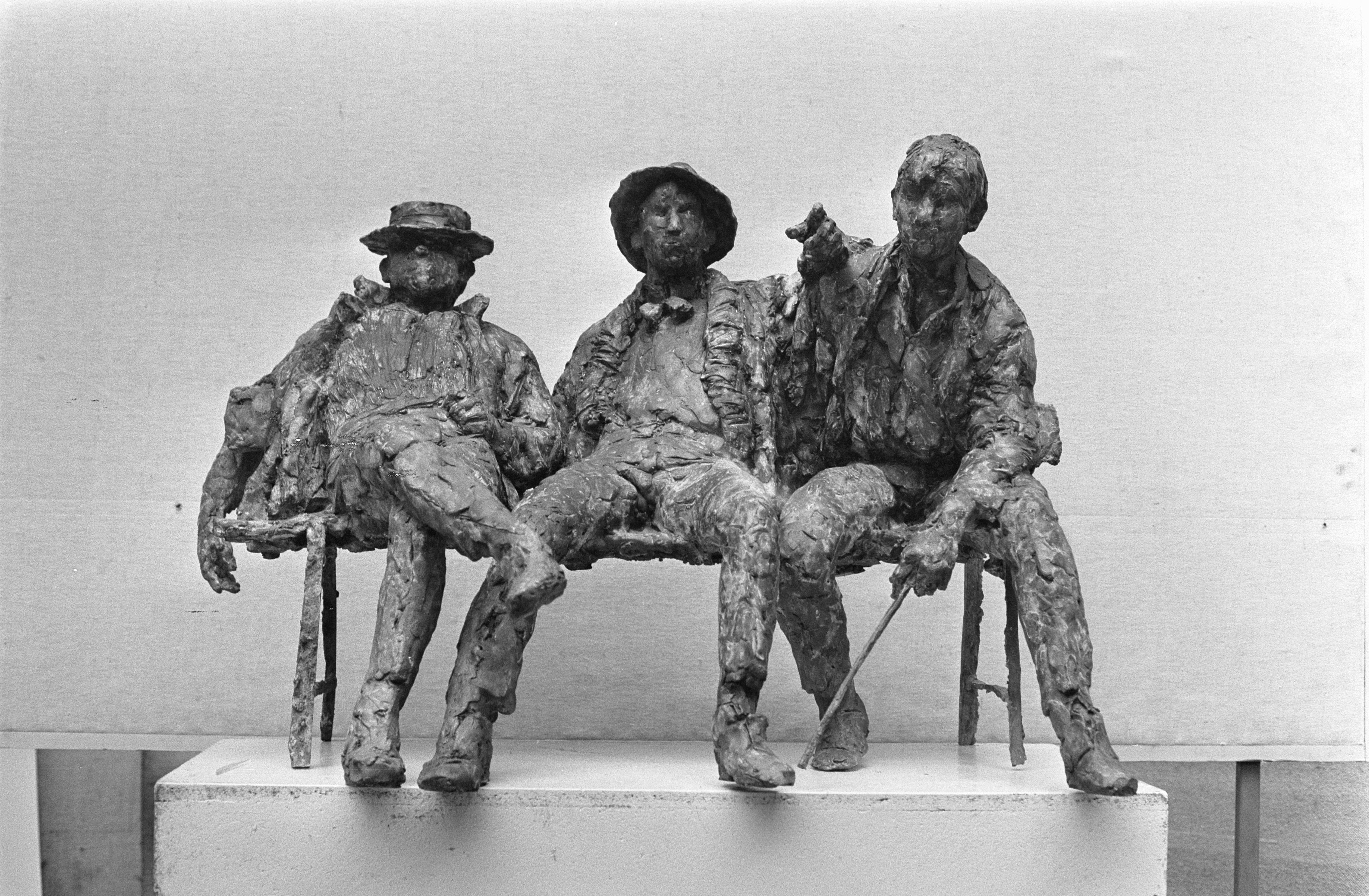 Collectie / Archief : Fotocollectie Anefo Reportage / Serie : [ onbekend ] Beschrijving : Opdracht Bayens beeldje drie mannetjes Datum : 6 mei 1969 Trefwoorden : beelden Fotograaf : Verhoeff, Bert / Anefo Auteursrechthebbende : Nationaal Archief Materiaalsoort : Negatief (zwart/wit) Nummer archiefinventaris : bekijk toegang 2.24.01.05 Bestanddeelnummer : 922-3858